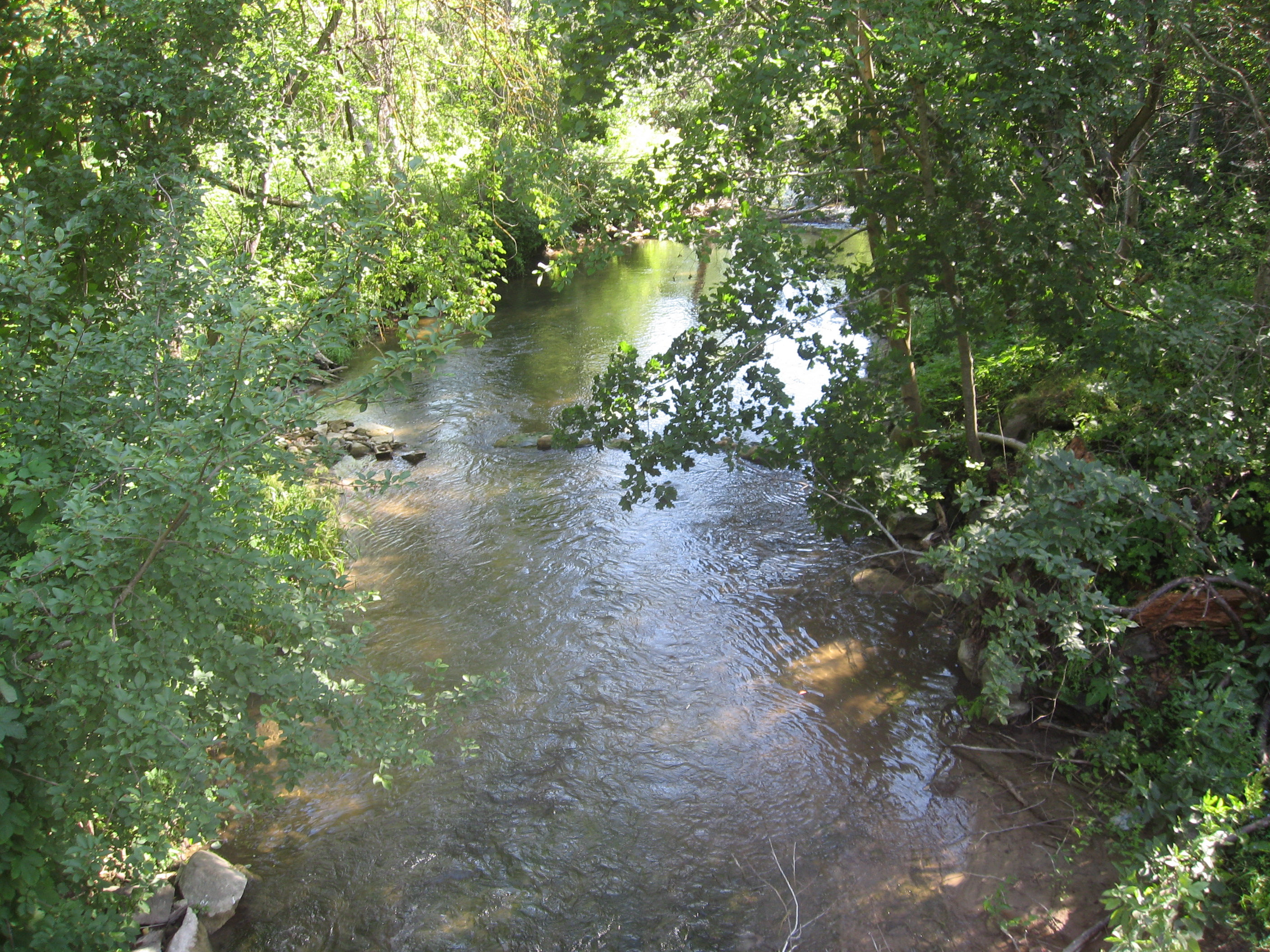 říčka Toolse poblíž svého ústí do Kunda laht